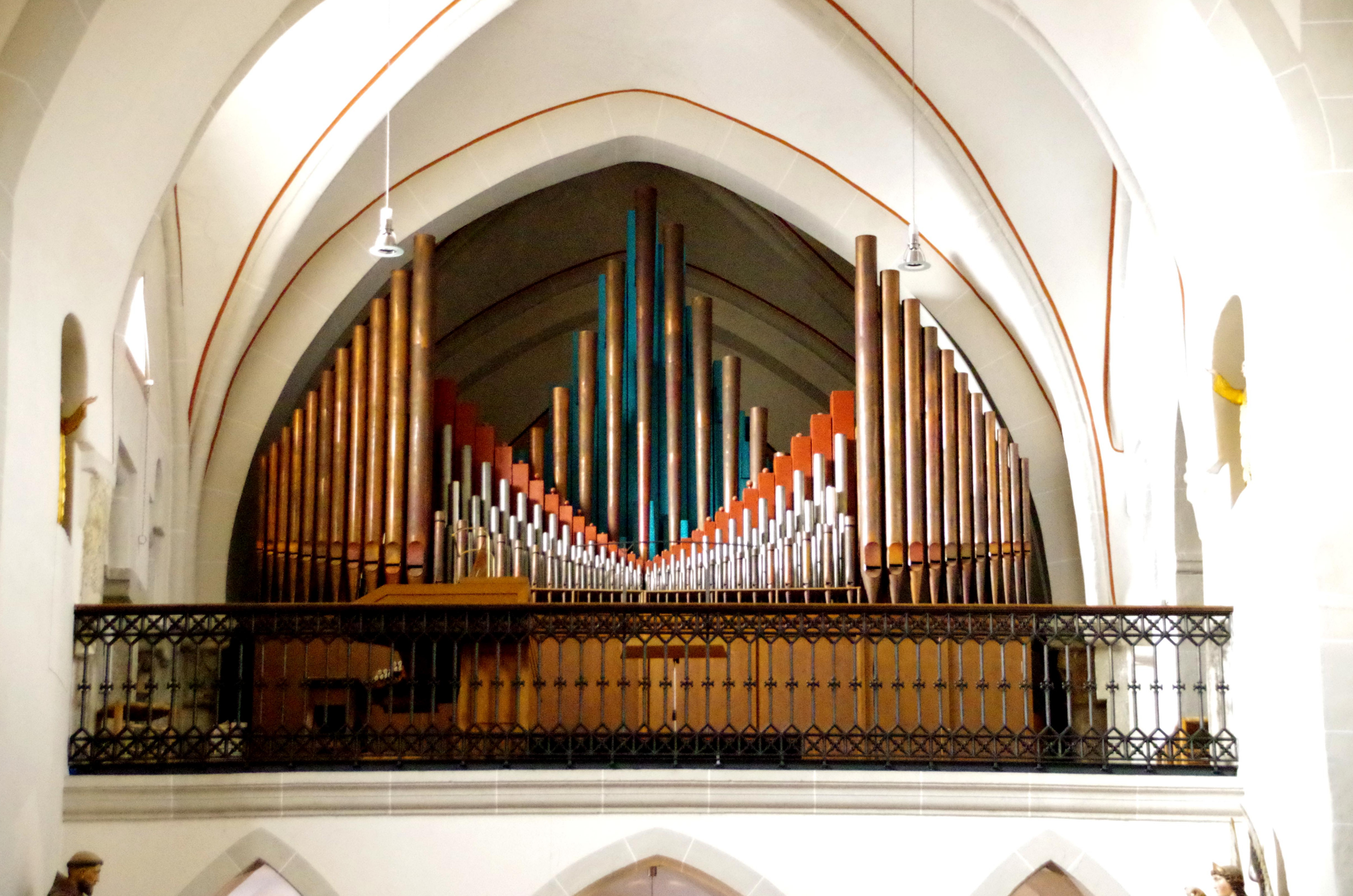 St. Medardus (Bendorf), Orgelempore